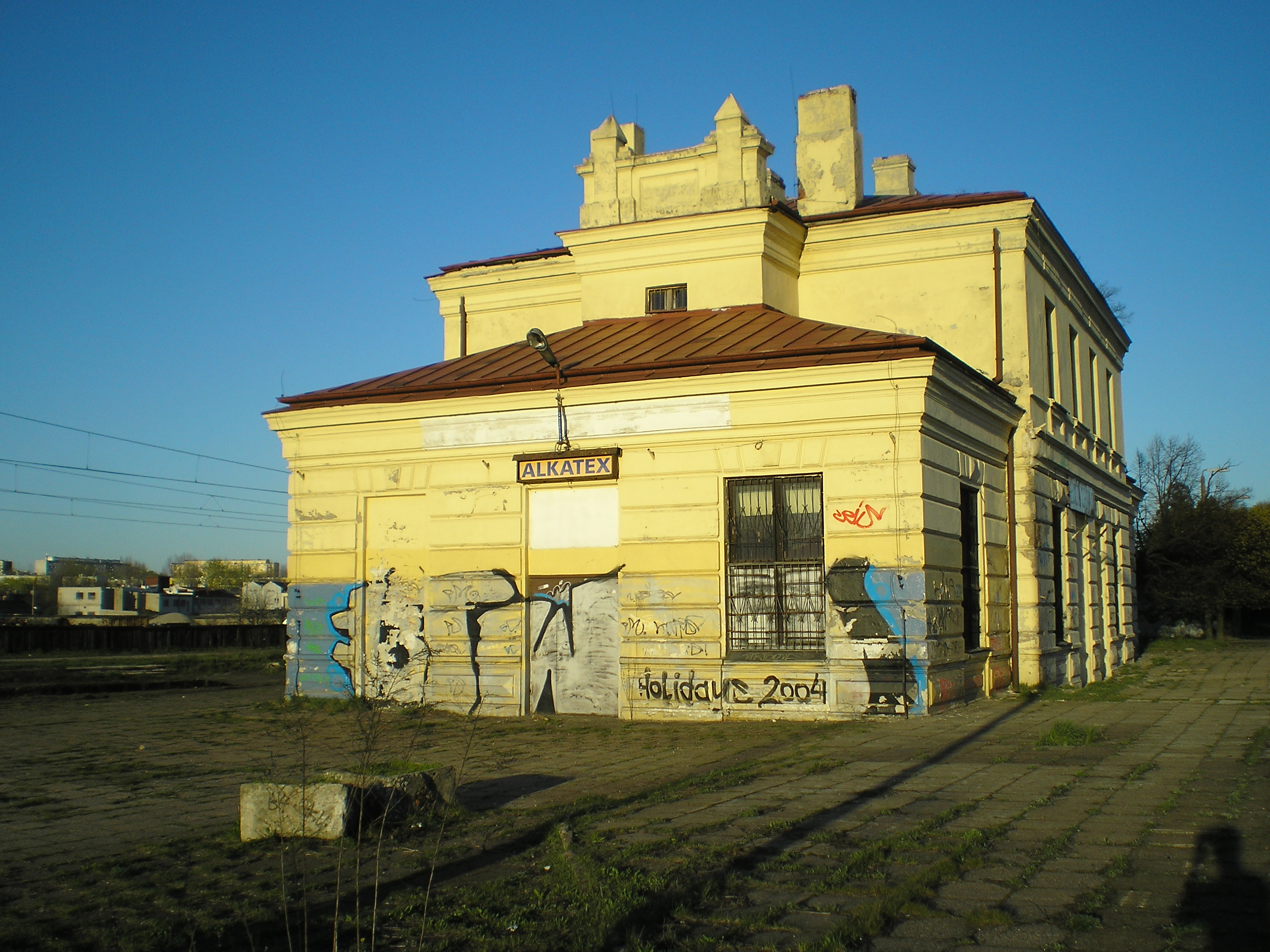 Budynek Stacji PKP Łódź-Chojny